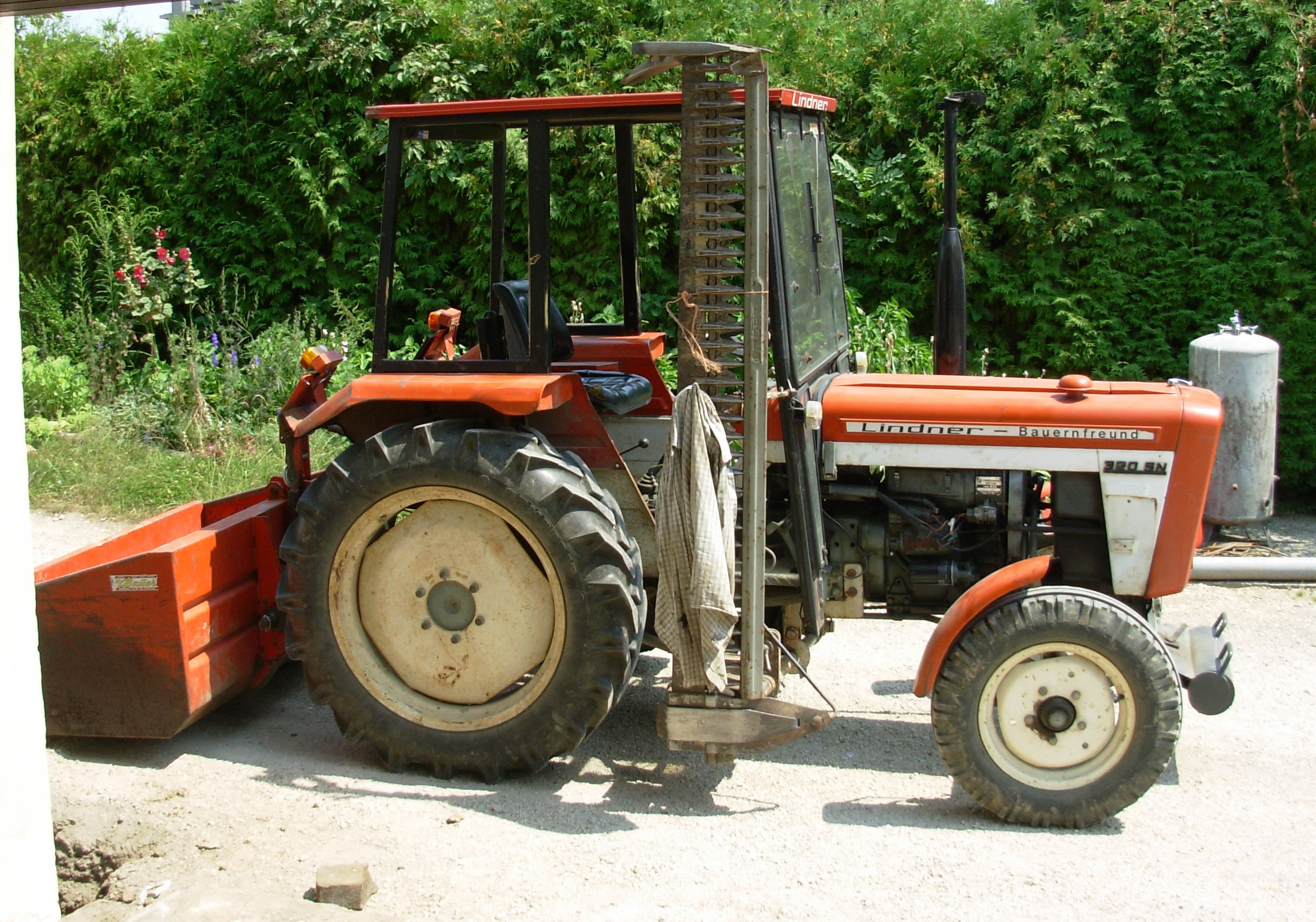 Lindner „Bauernfreund“ BF 320 SN, eigener Traktor am eigenen Hof